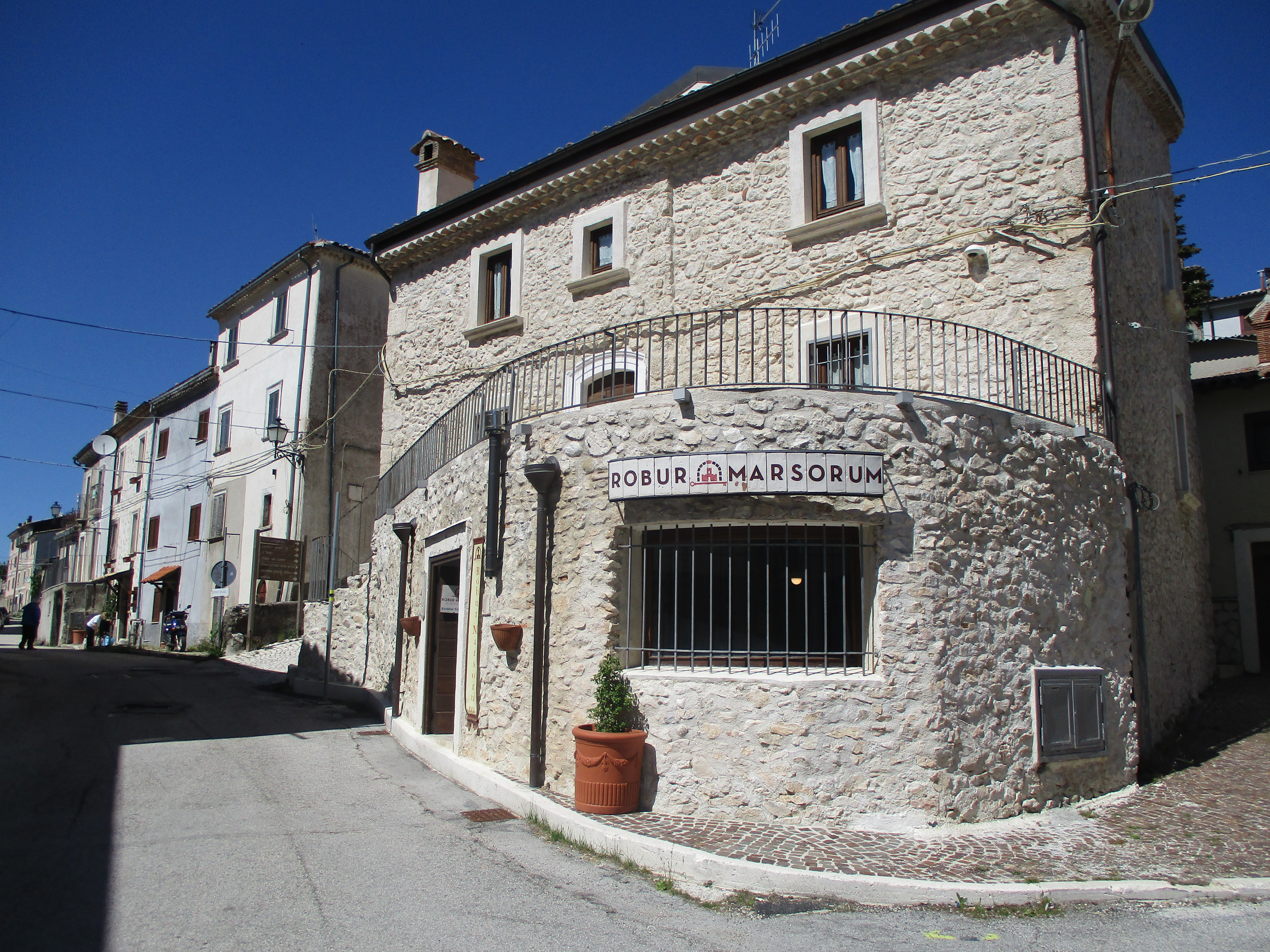 Scorcio del borgo antico